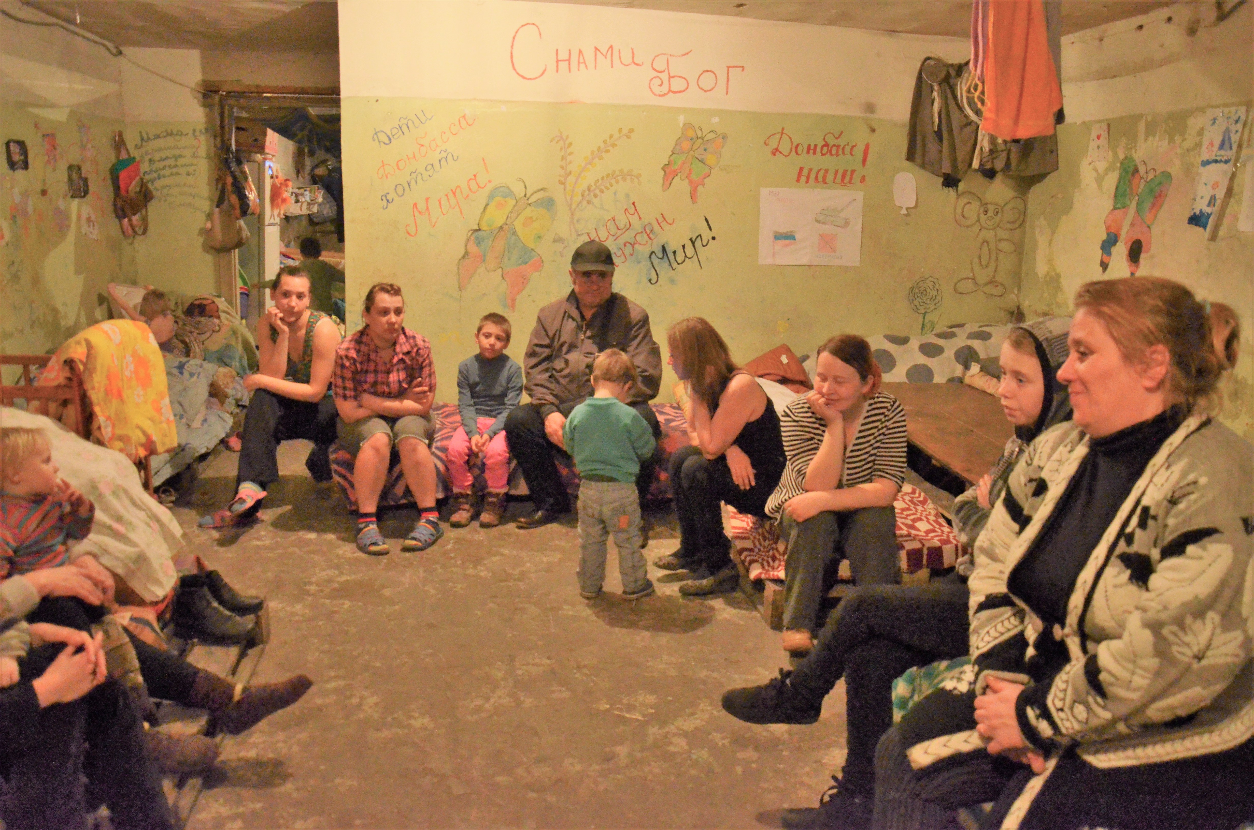 Снято во время поездки по бомбоубежищам Петровского района Донецка